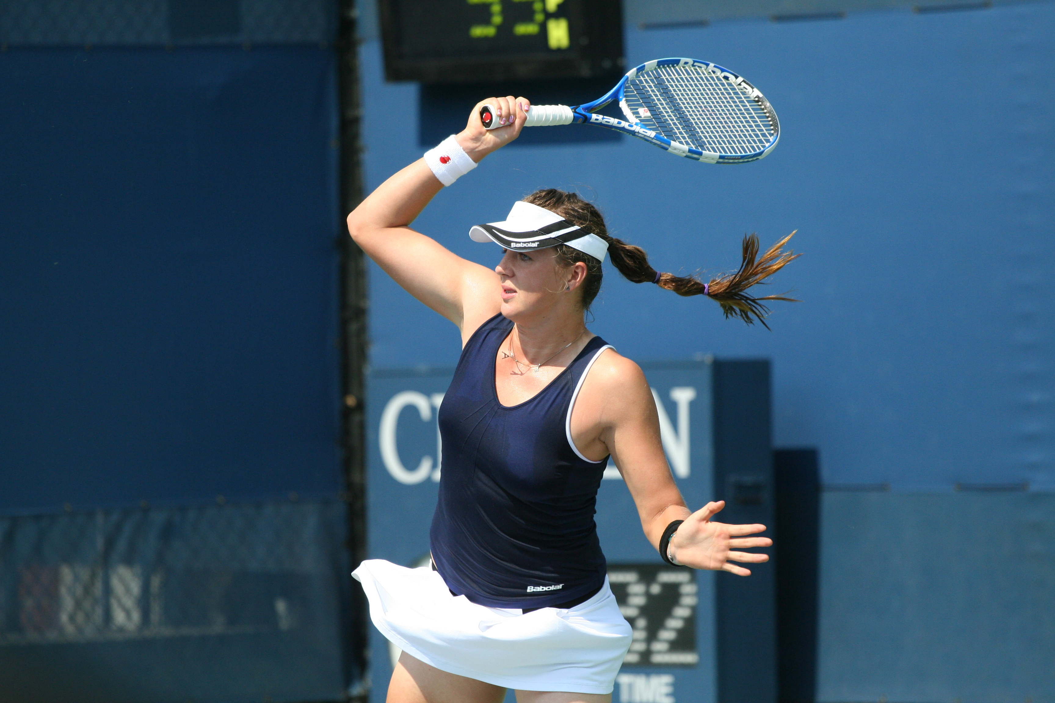 U.S. Open; Sept. 1, 2010